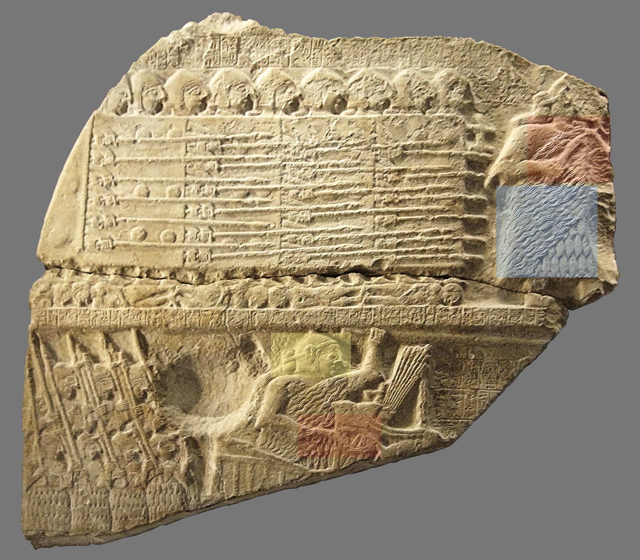 This file was derived from: Stele of Vultures detail 01-transparent.png con evidenziati alcuni particolari